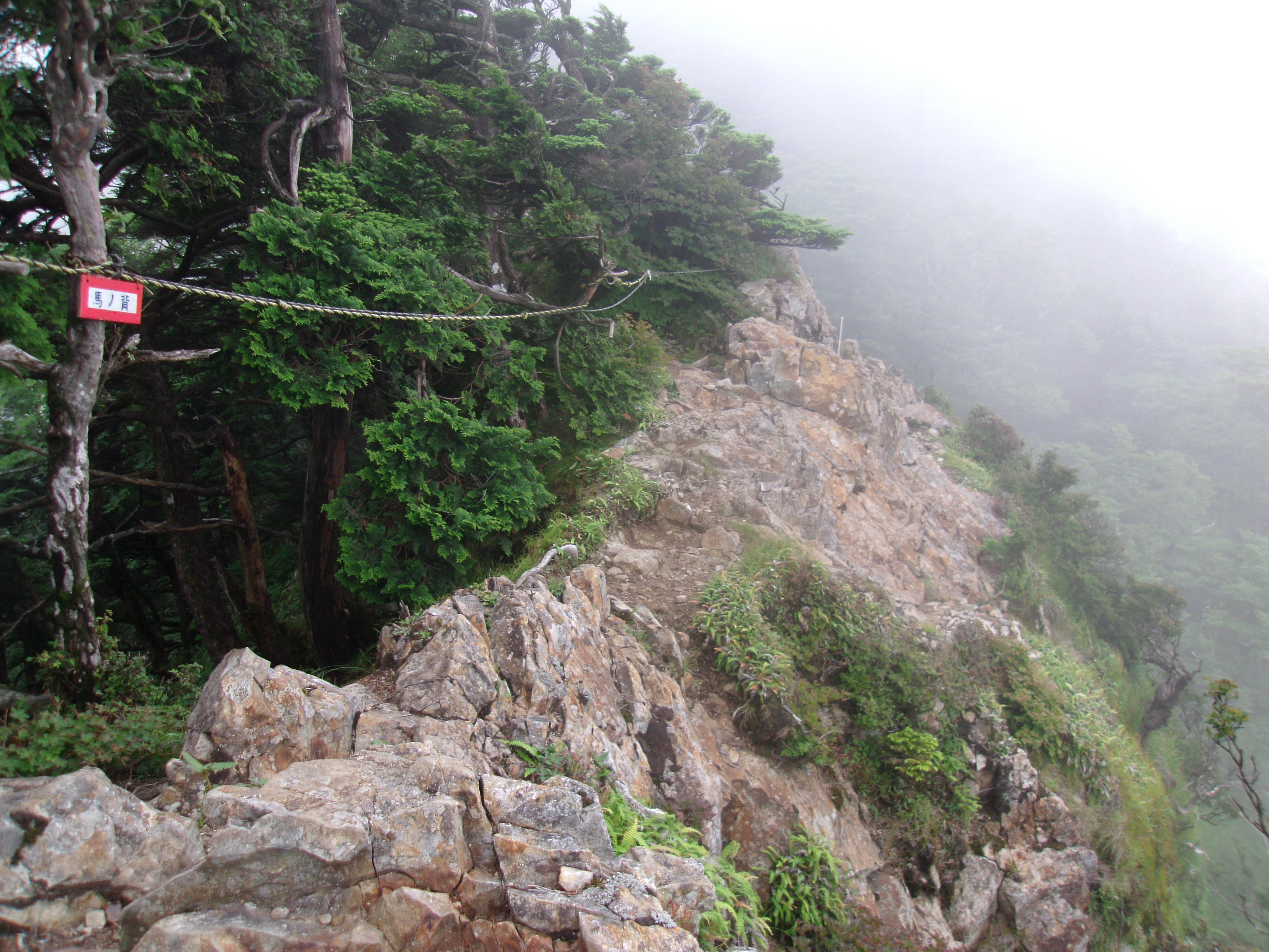 大峯奥駈道第41靡「空鉢岳」と40靡「釈迦ヶ岳」の間にある「馬の背」 大峯奥駈道で何カ所かある垂直登攀降下の岩場を除くと最大の難所である。平場がなく左右とも崖になる尾根の稜線を10m程進まねばならないが、常に風が吹いており危険。